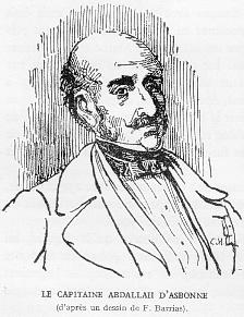 Portrait d'Abdallah d'Asbonne tiré d'un ouvrage du XIXe siècle.